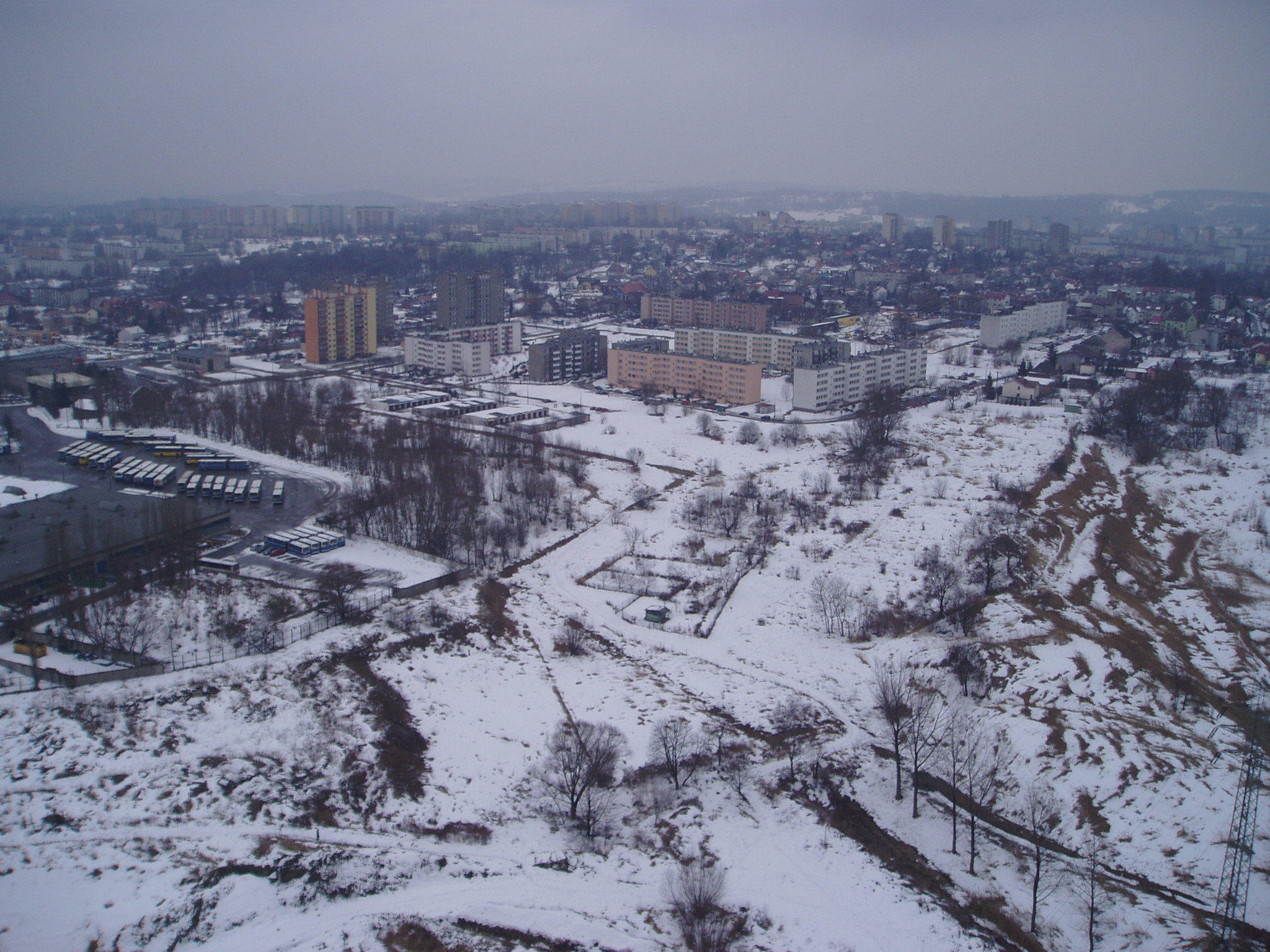 Ogólny widok na Wolę Duchacką (Kraków).